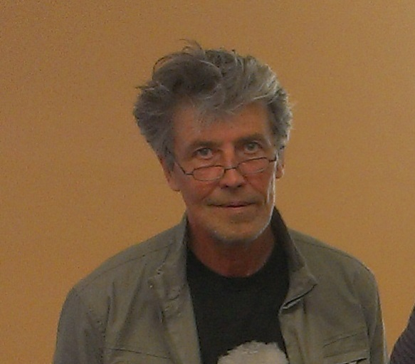 Leo Lätti 11 Mai 2014